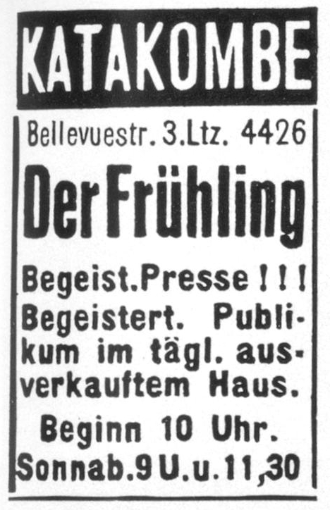 Anzeige des Berliner Kabaretts "Die Katakombe" für das Programm "Der Frühling", 1930.